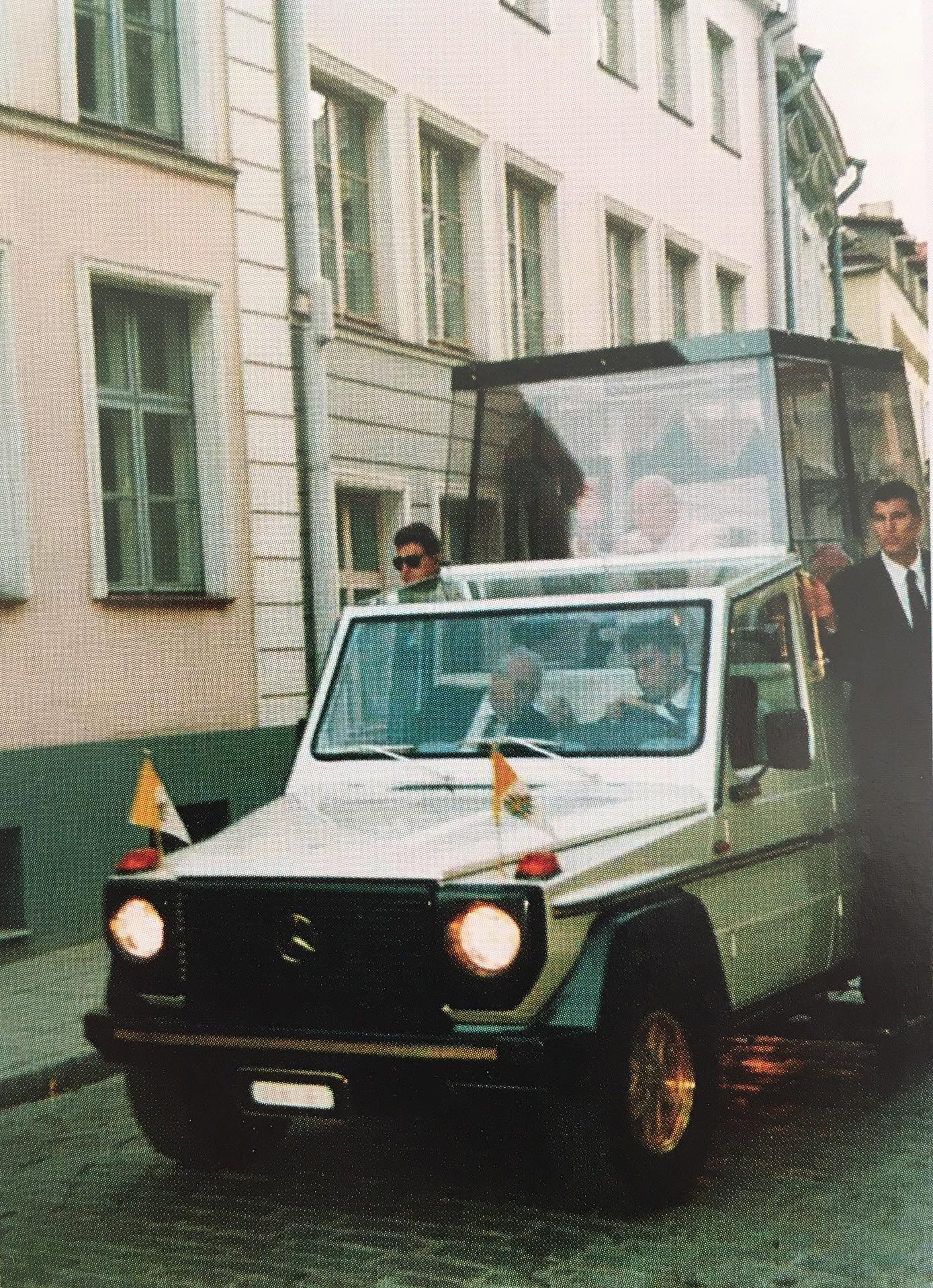 Johannes Paulus II eskort möödumas Šoti Klubist 1993 aastal avamise avamise päeval